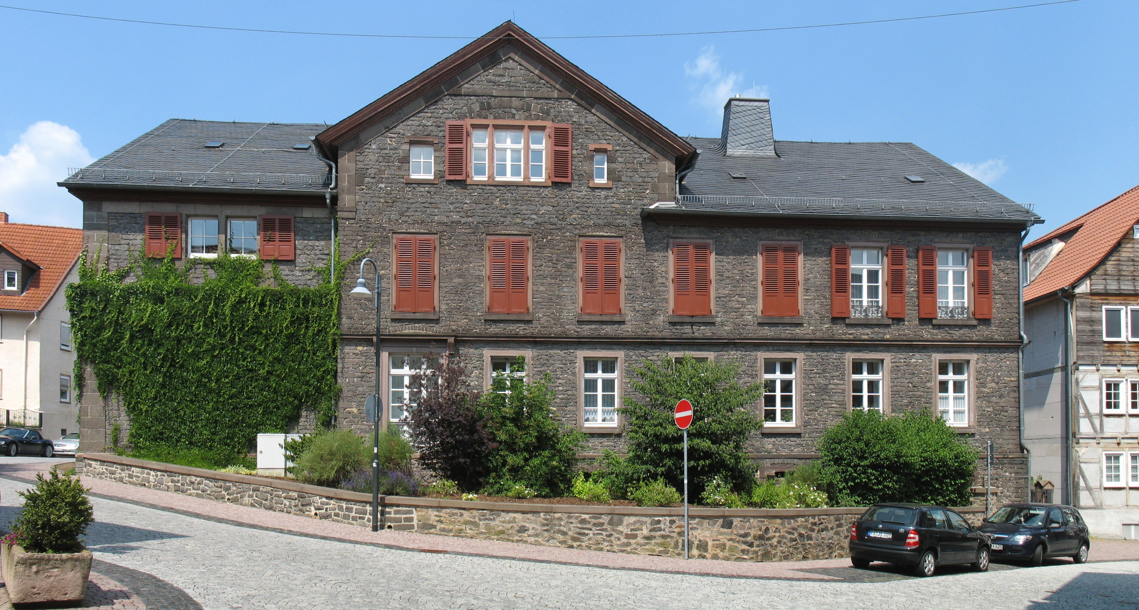 Altes Amtsgericht in Alsfeld